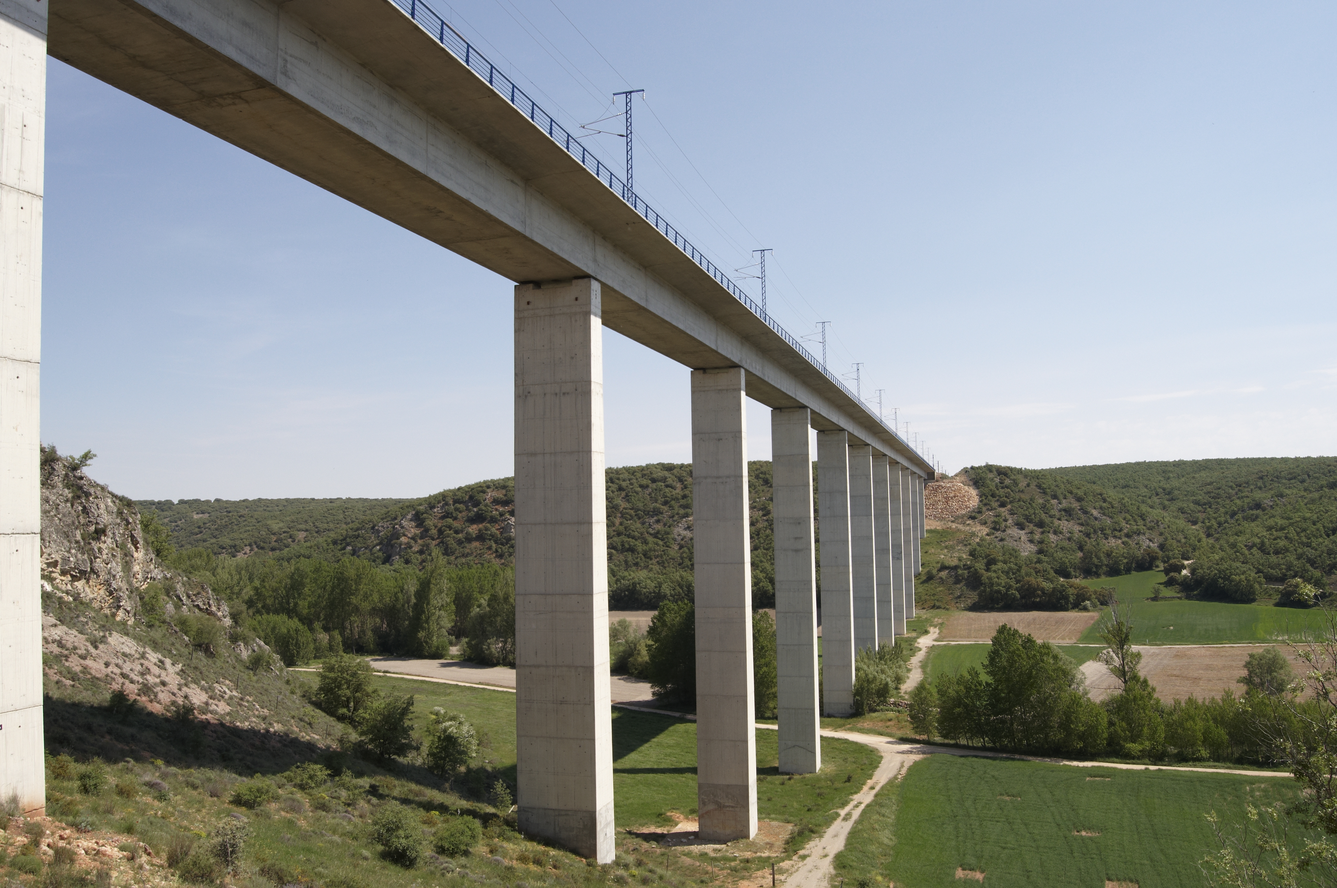 Puente & Campo